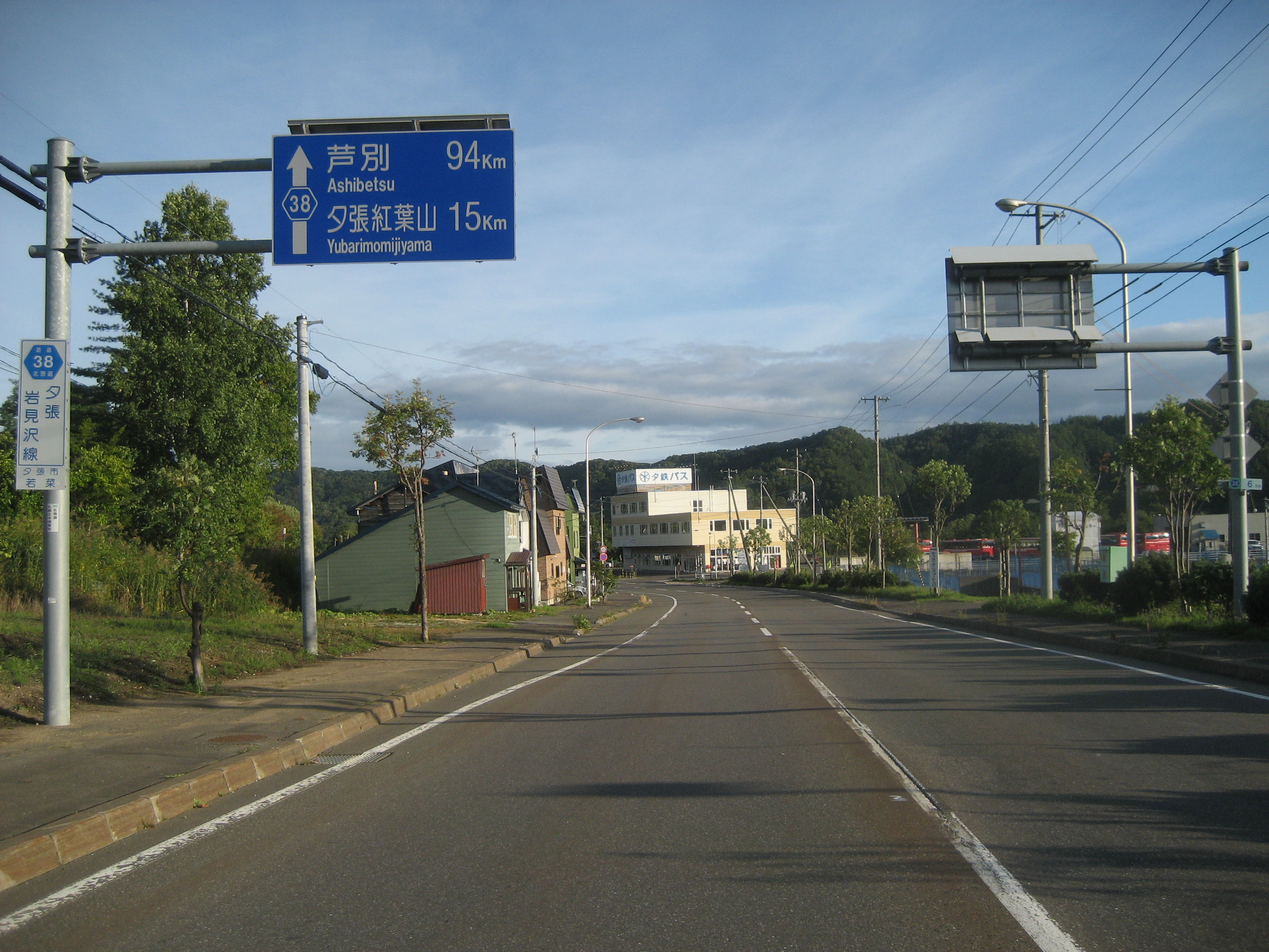 北海道道38号線夕張市若菜付近（芦別方面を撮影）